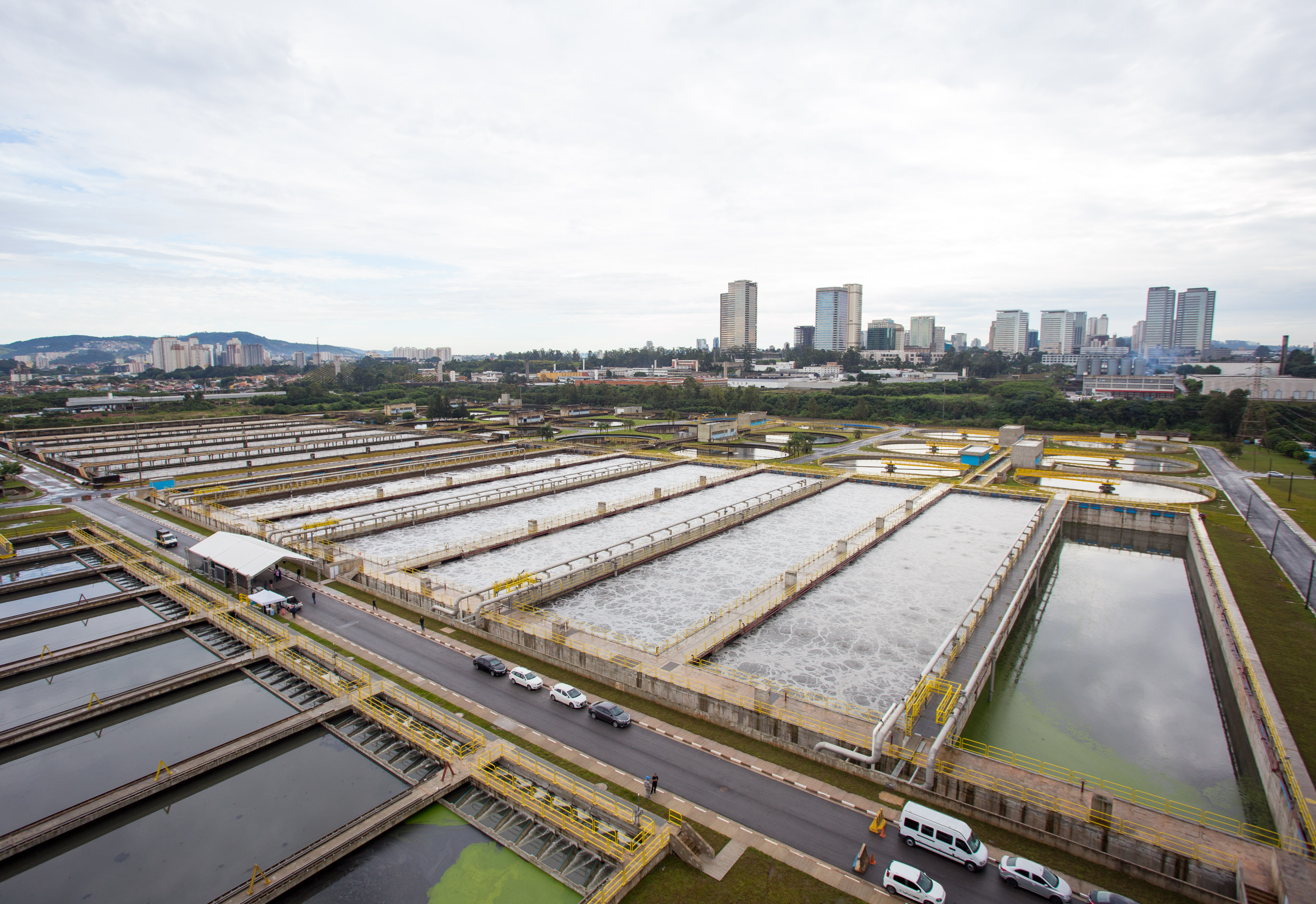 O Governador Geraldo Alckmin, participa da inauguração das Obras de Ampliação da Estação de Tratamento de Esgotos de Barueri e Assinatura de Decreto para criação de Batalhão.DATA 07/06/2017. LOCAL: São Paulo/SP. FOTO: Diogo Moreira